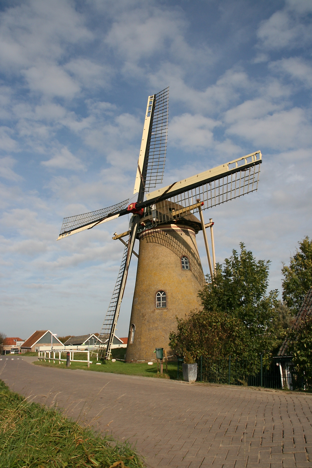 Puttershoek: molen De Lelie